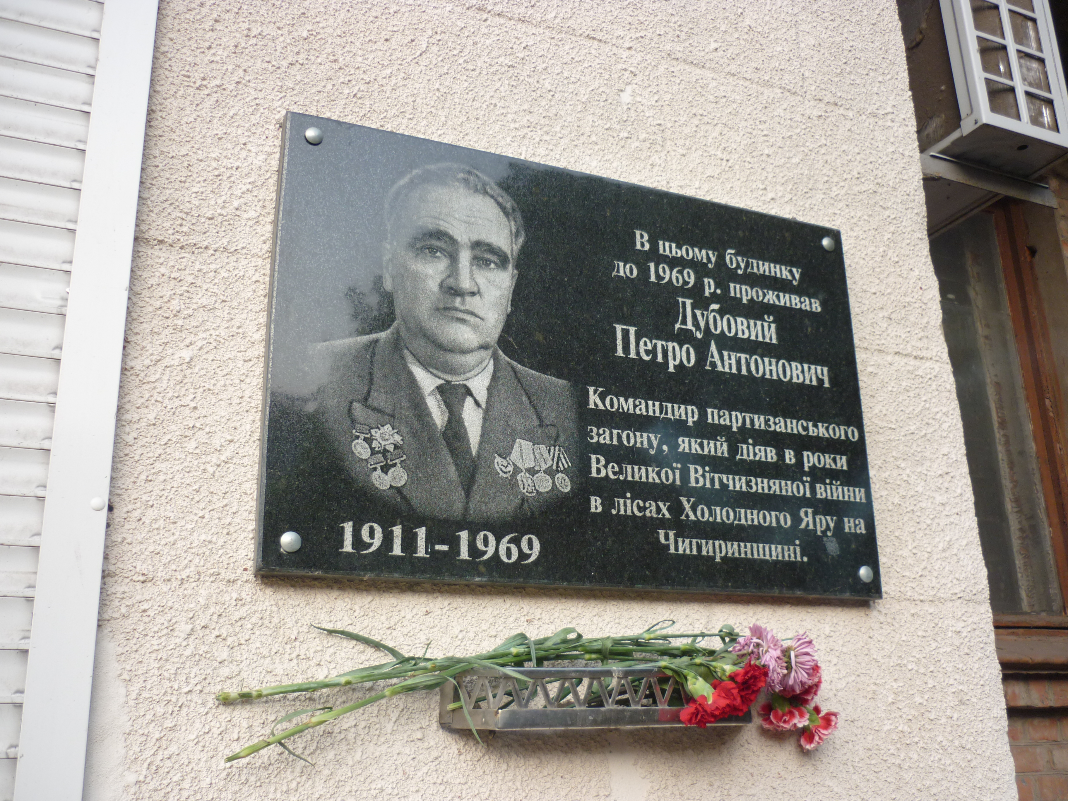 Пам'ятна дошка на фасаді будинку, де жив Дубовий П.А., командир партизанського загону, що діяв в роки ВВВ в Холодному Яру